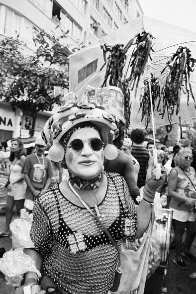 Défilé de la Banda de Ipanema, lors du carnaval de Rio de Janeiro (Brésil) en 2004. Photographie prise par utilisateur:Clem Cousi Utilisateur:Clem Cousi